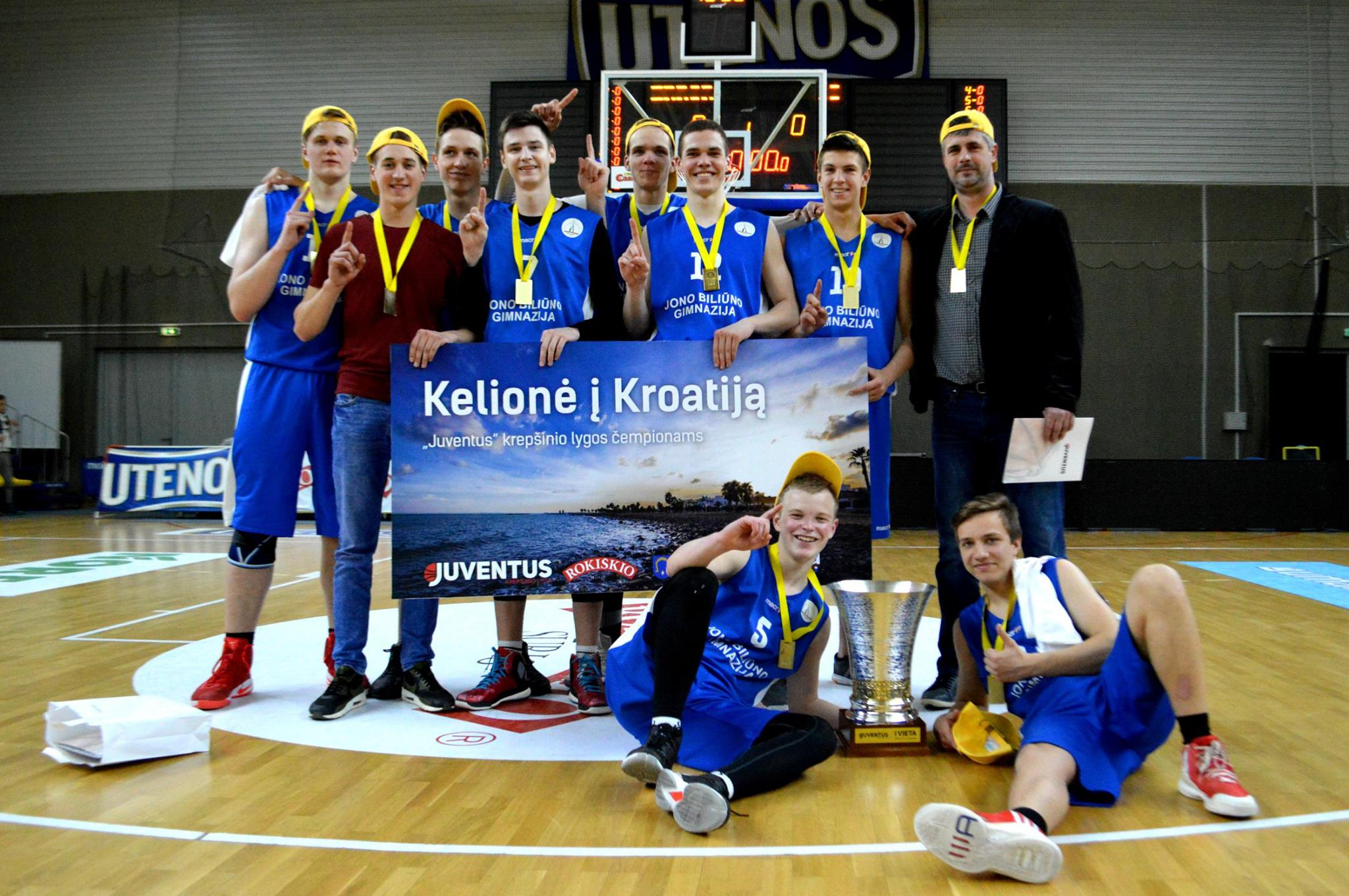 Juventus krepšinio lygos 2016-2017 m. čempionai